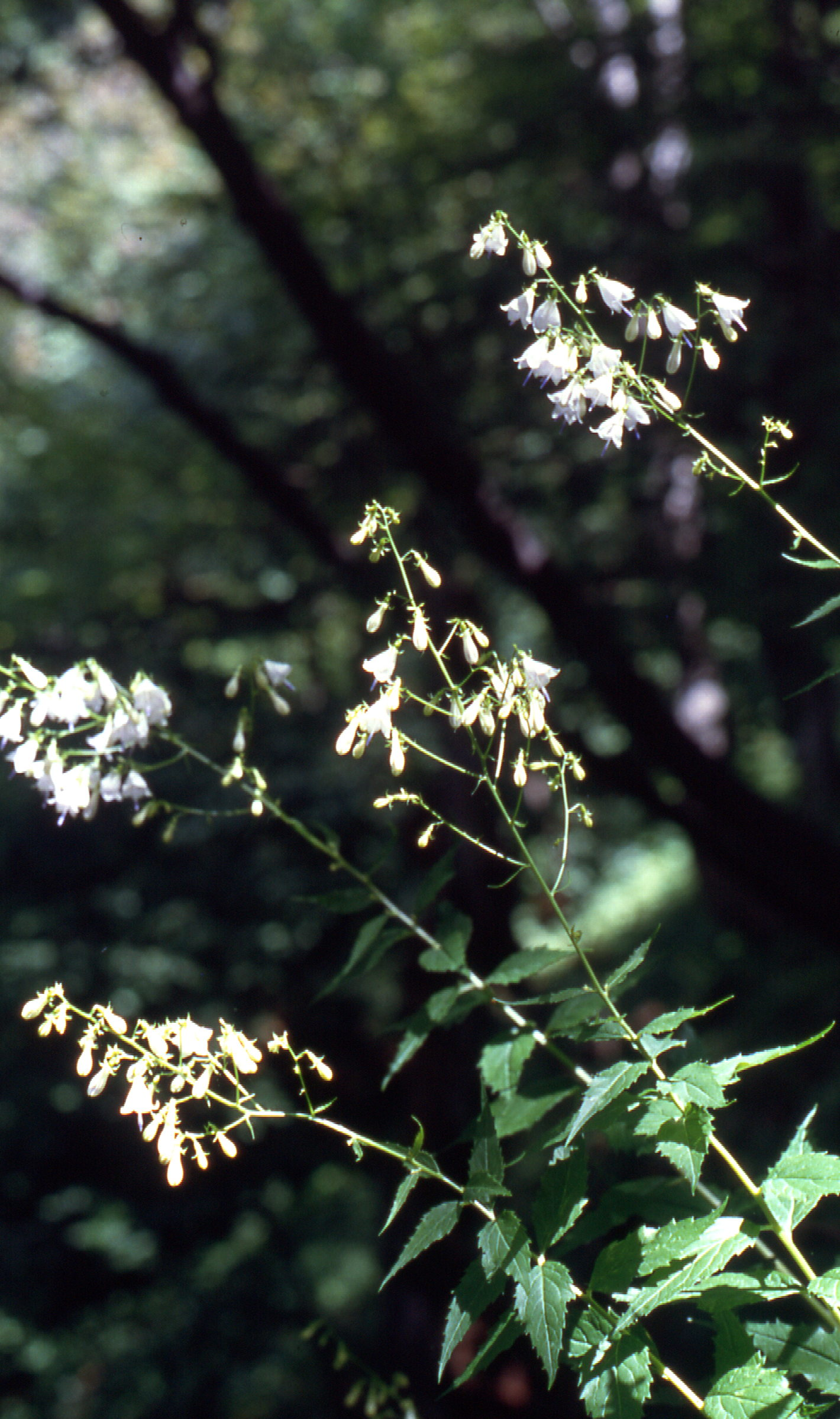 Adenophora liliifolia in Südslowenien am Berghang in 830m ü.NN. Aufnahme am 29.07.2000 bei Osilnica von Berwianr